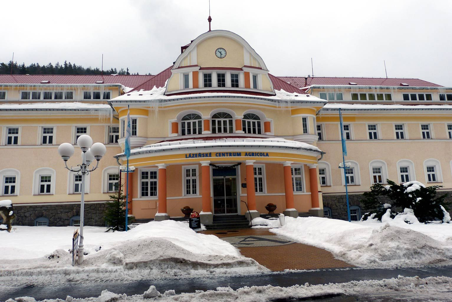 Aquacentrum Agricola